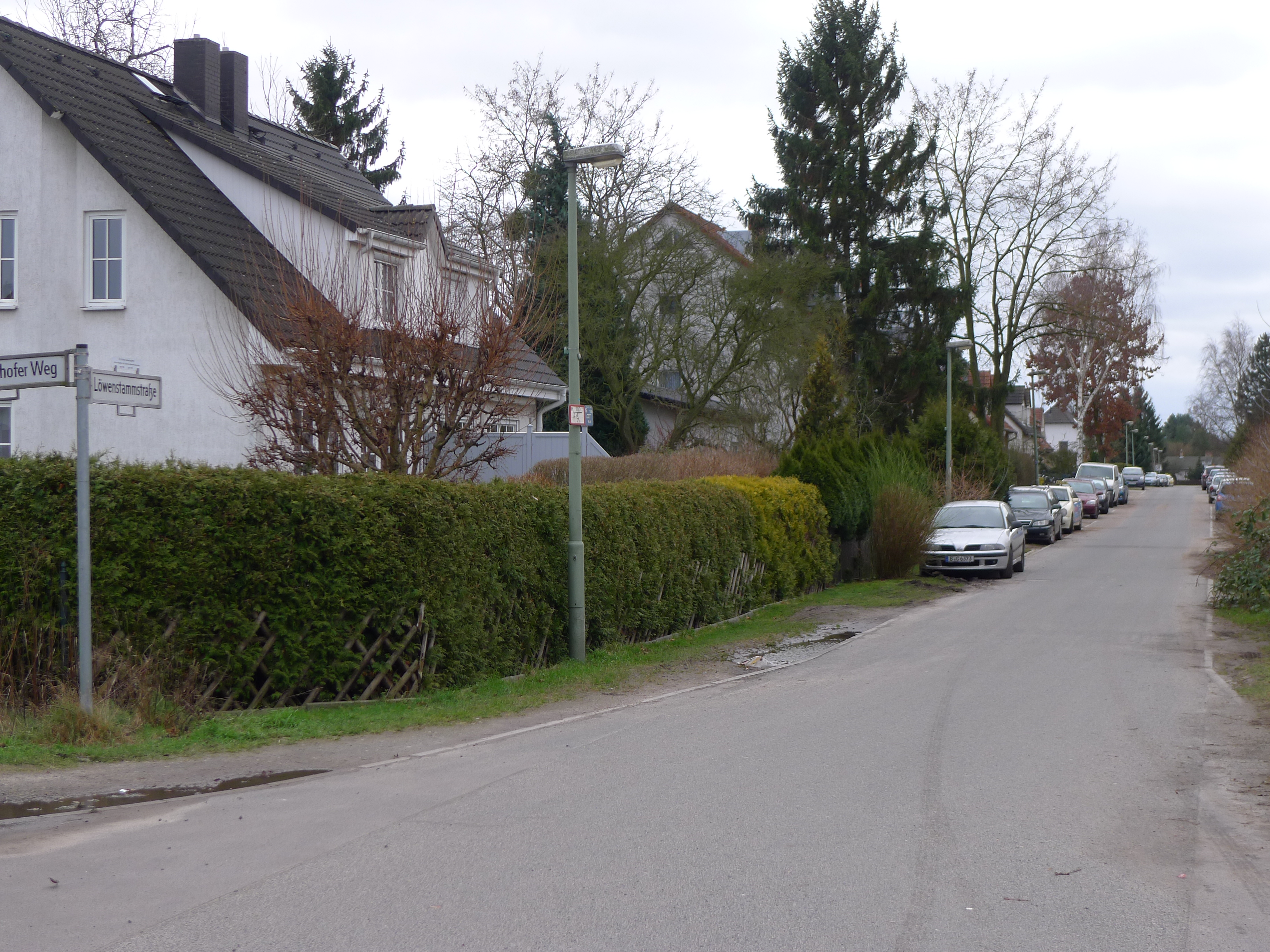 Straßenpanorama